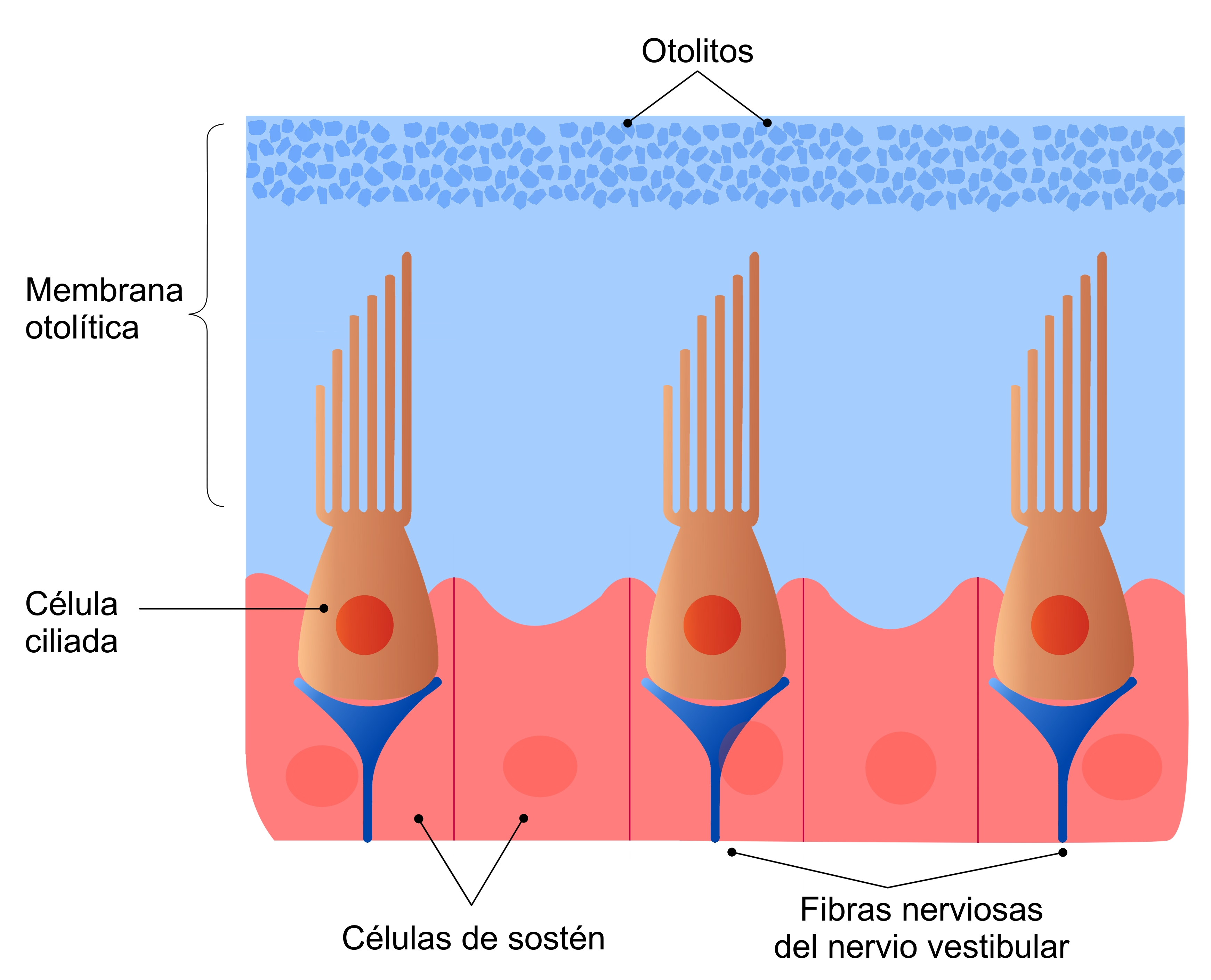 Esquema de la región macular del sáculo en el oido interno. Son visibles las células ciliadas, la membrana otolítica y los otolitos que la cubren.